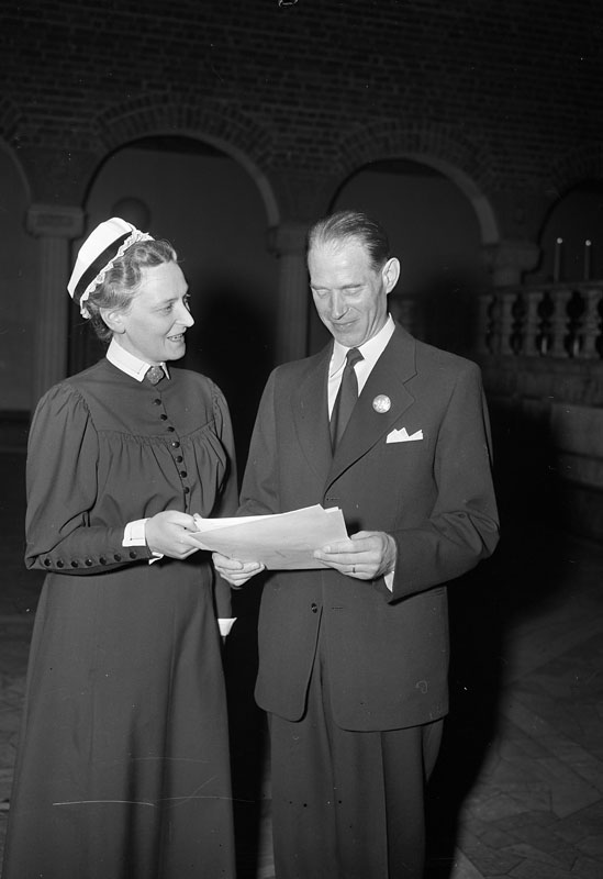 Hantverkargatan 1, Blå hallen i Stadshuset. Föreståndarinnan för S:t Eriks sjuksköterskeskola Anna Dahlström tillsammans med den (nyutexaminerade) första manliga sjuksköterskan Allan Härsing.